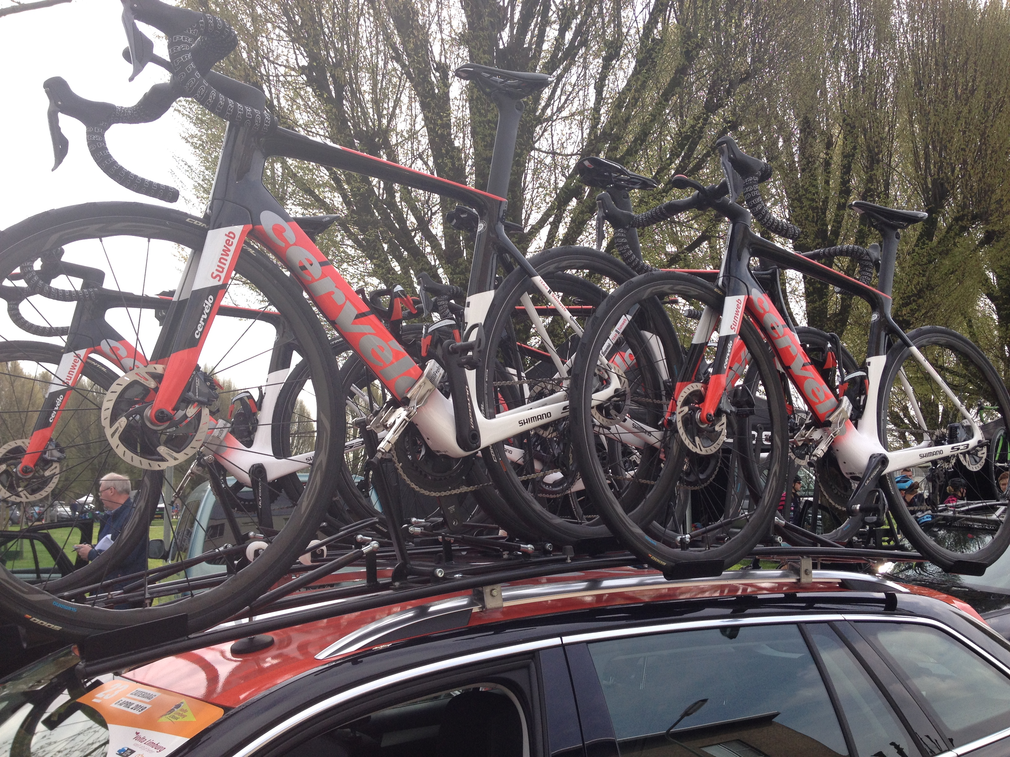 Volta Limburg Classic 2019 voor vrouwen met start en finish in Eijsden, Limburg, Nederland